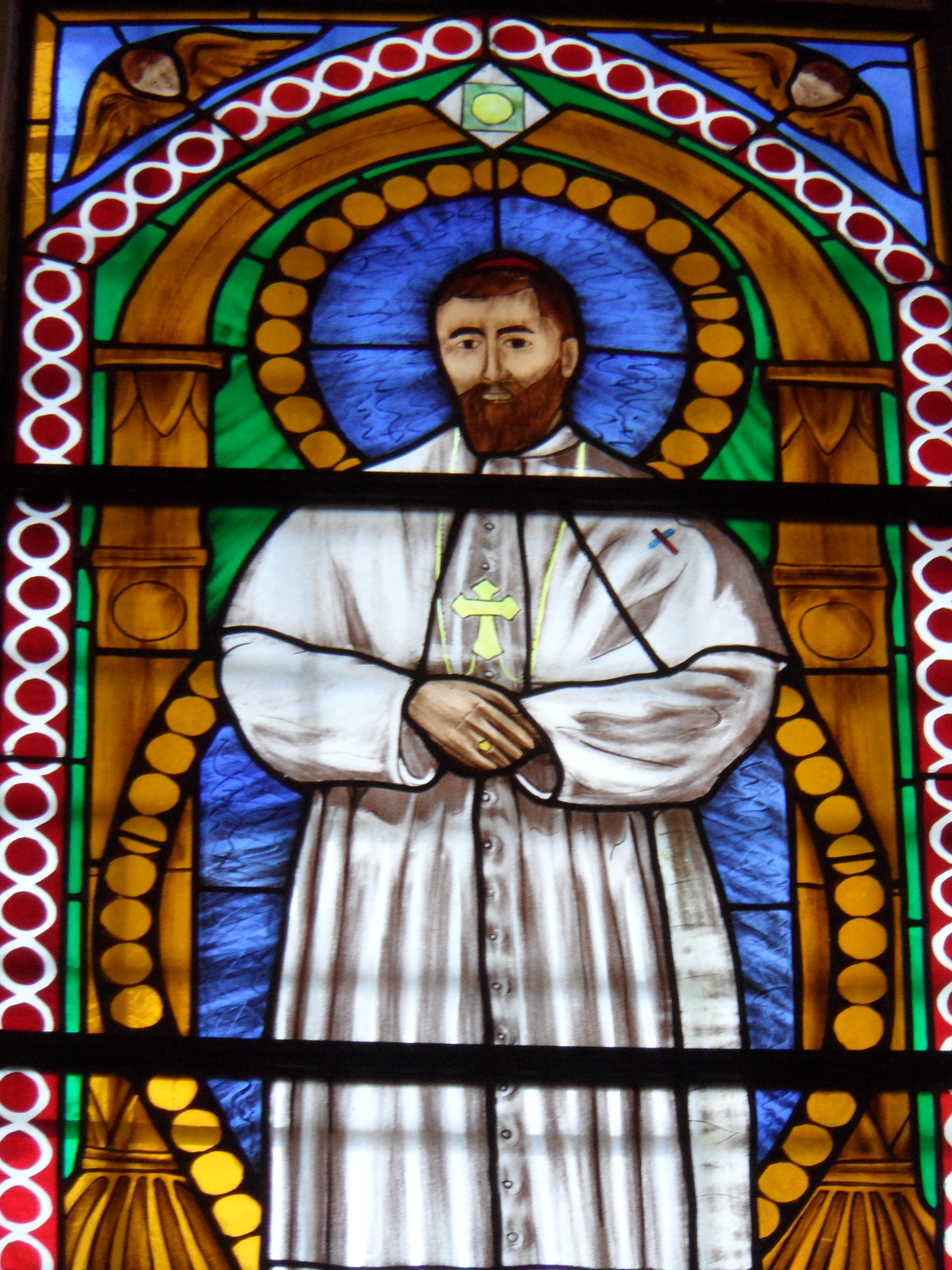 Vitral en la Iglesia de Santo Tomás in Formis de Roma.